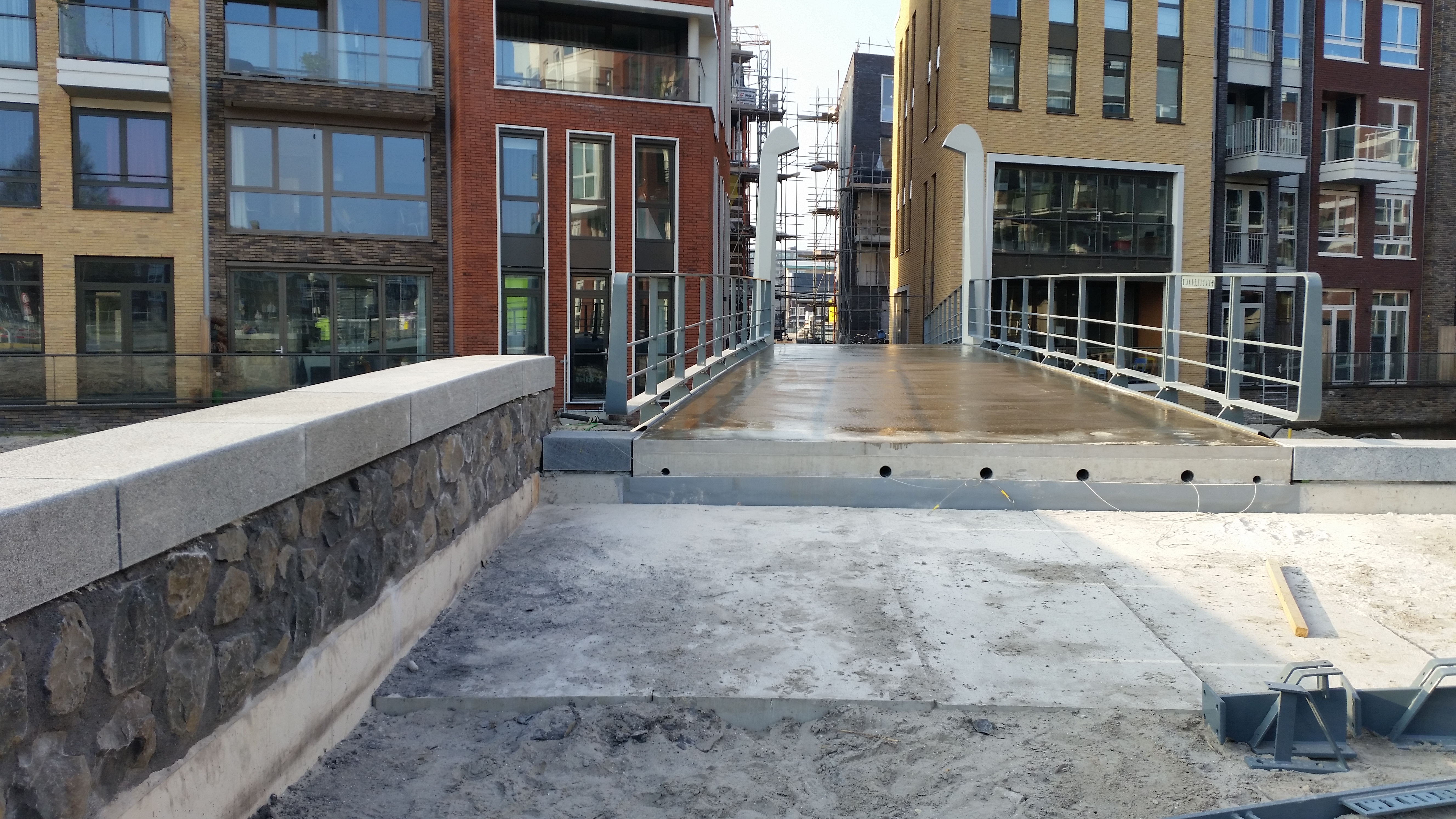 Overzicht over de Windaubrug